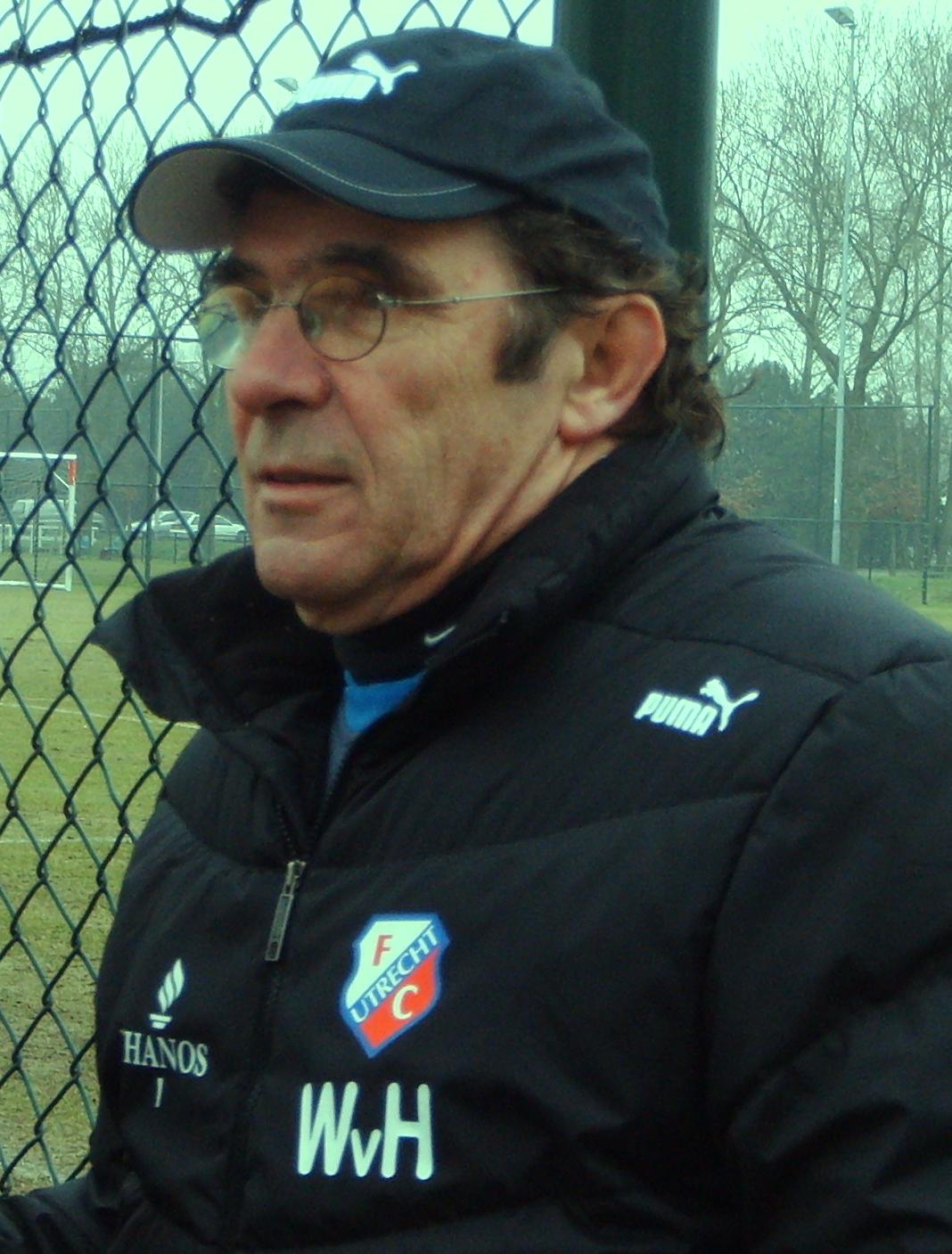 Willem van Hanegem during a training